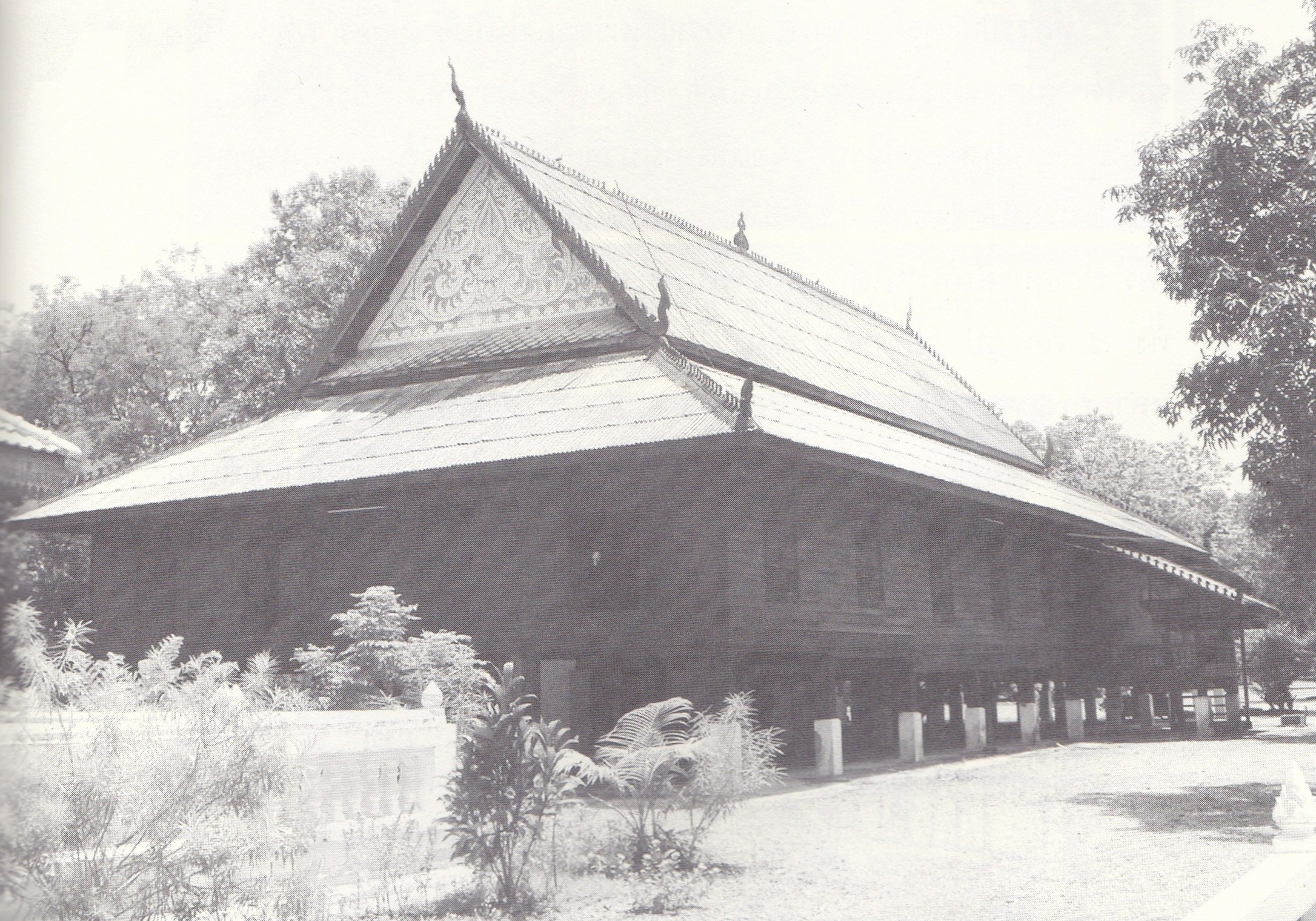 ศาลาวัดป่าสุนทราราม